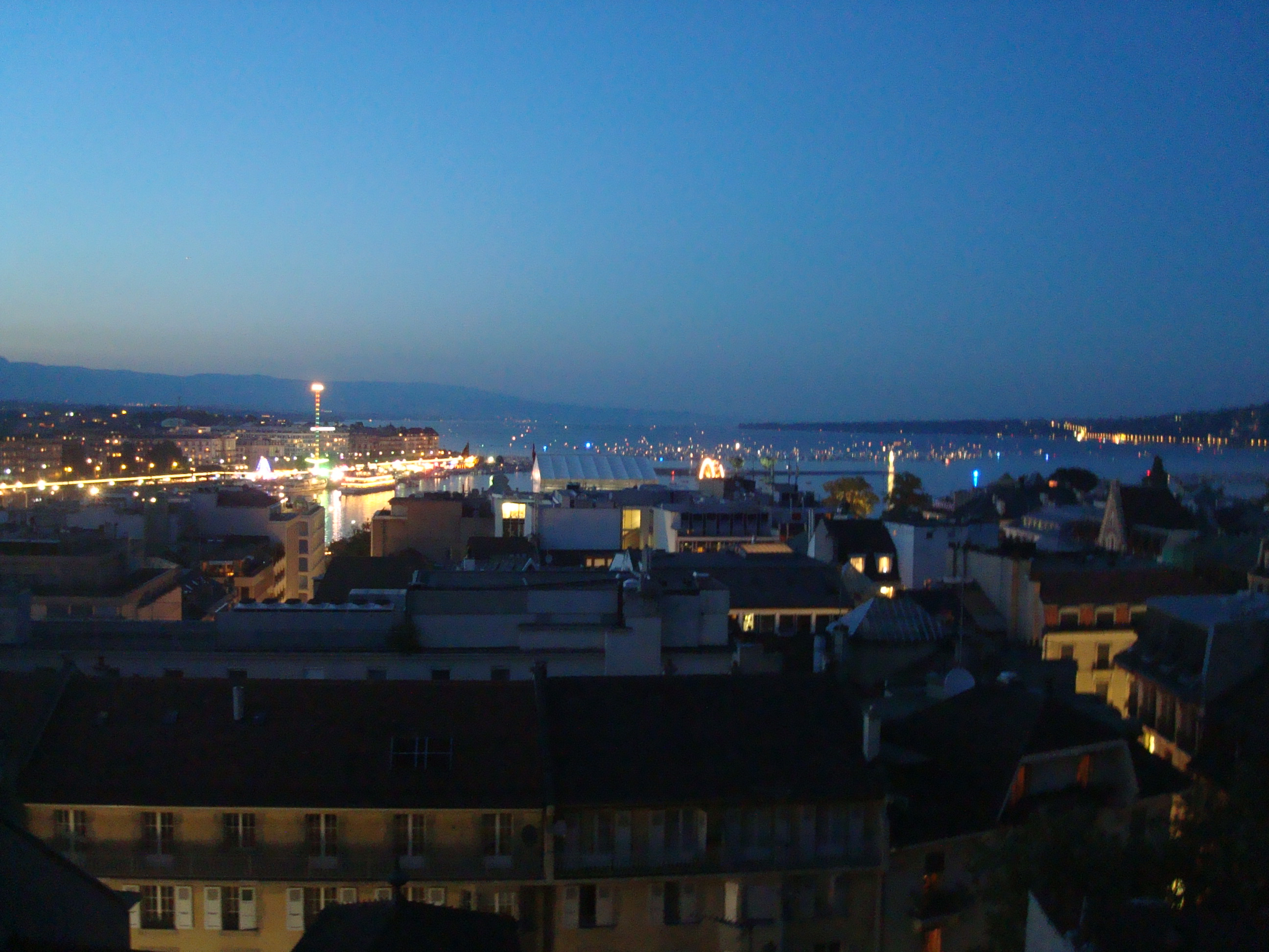 La rade de Genève de nuit / Geneva